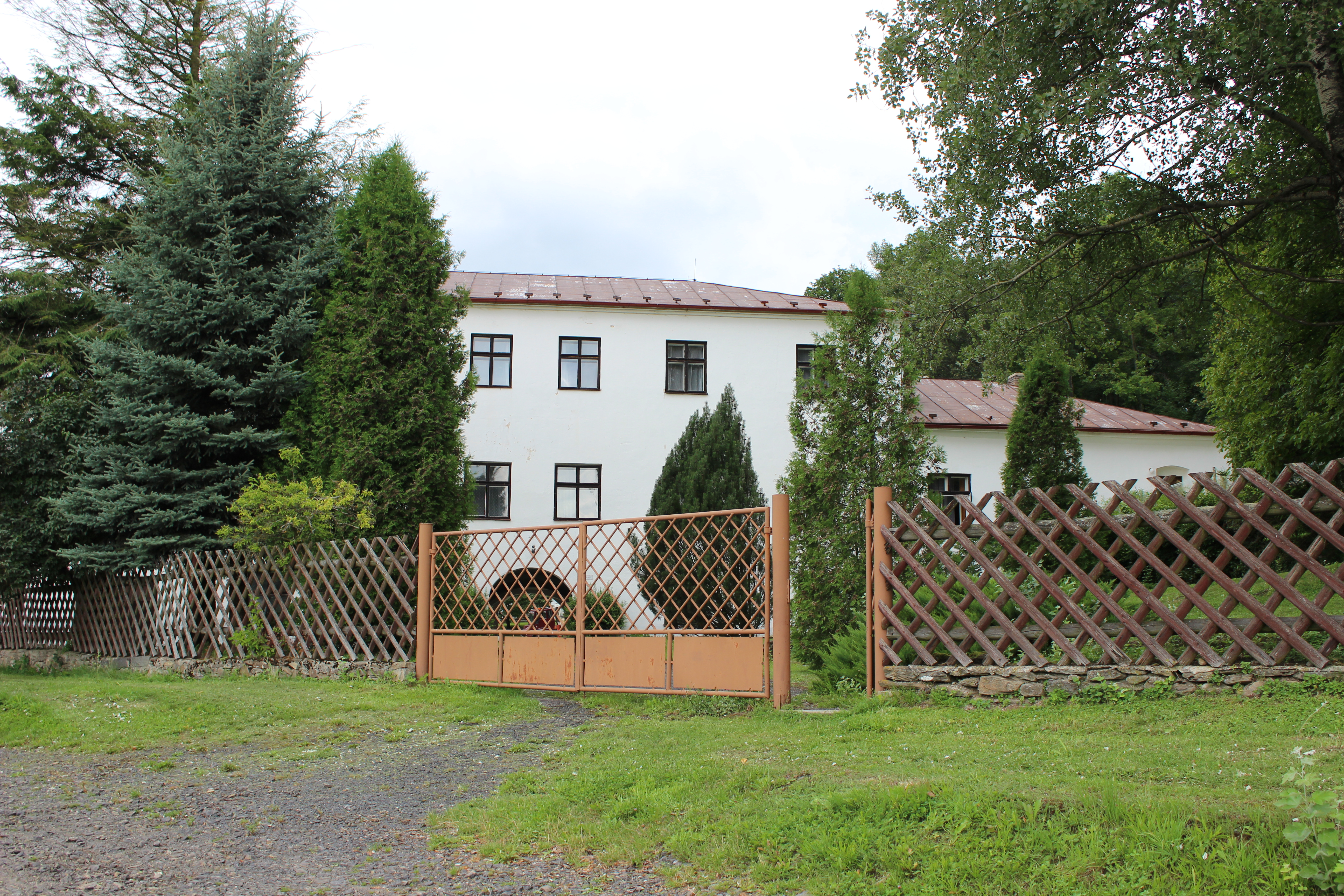 Zámek (dům číslo popisné 1) v Dolejším Těšově (pohled od východu).